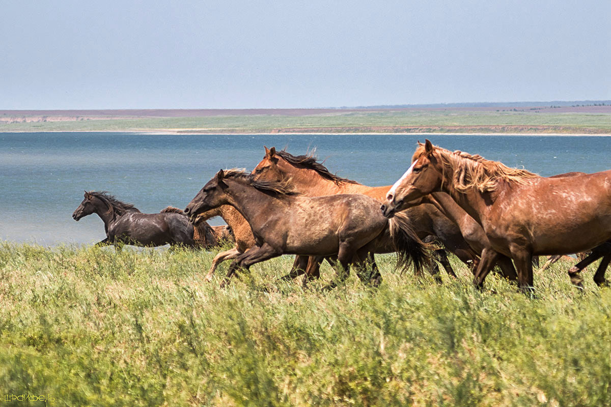 Ростовский заповедник: в центральной части Кума-Манычской впадины, к северу от оз. Маныч-Гудило, в Орловском и Ремонтнеском районах Ростовской области, Орловский район, Ремонтненский район, Ростовская область This image is related to the protected area of Russia number 6100108